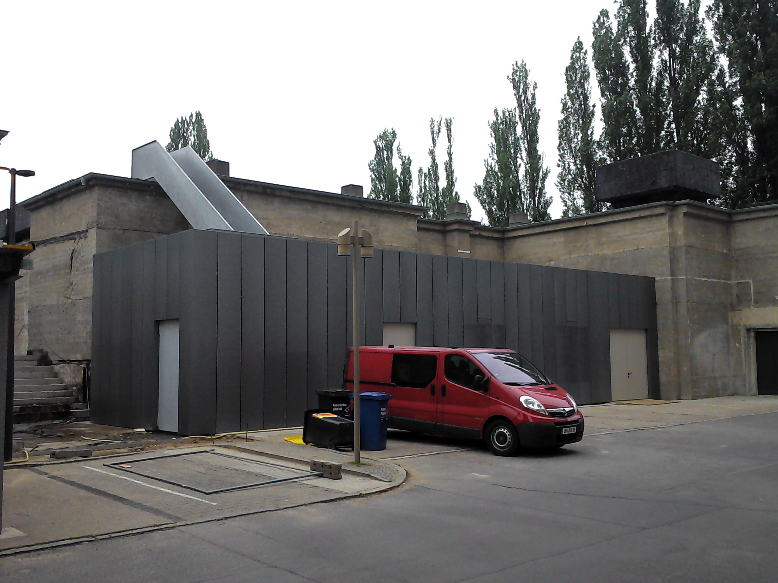 Der BASA-Bunker der Reichsbahn in Berlin nach dem Umbau 2016. Einrichtung als Privatmuseum.